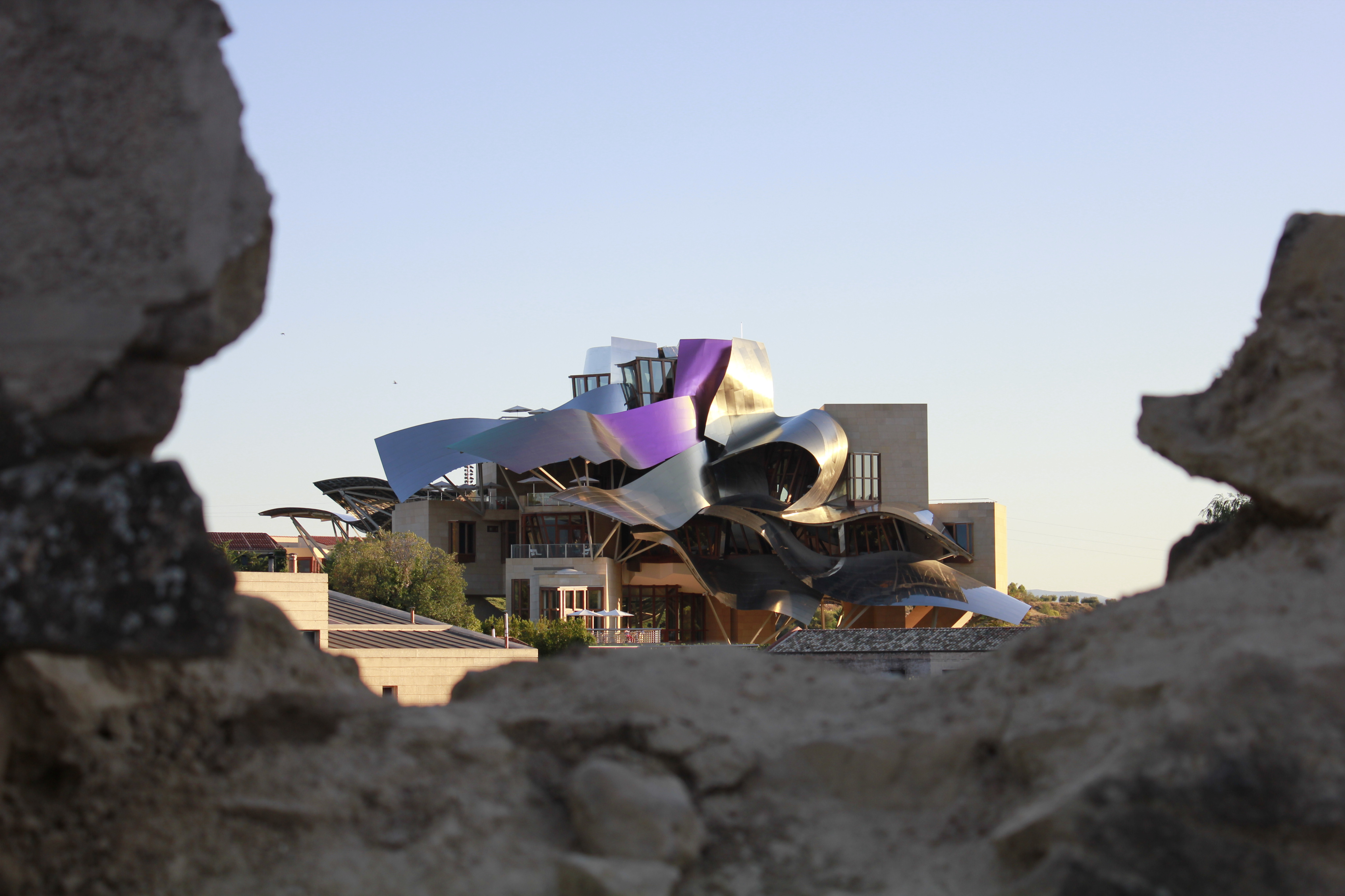 HOTEL MARQUES DE RISCAL